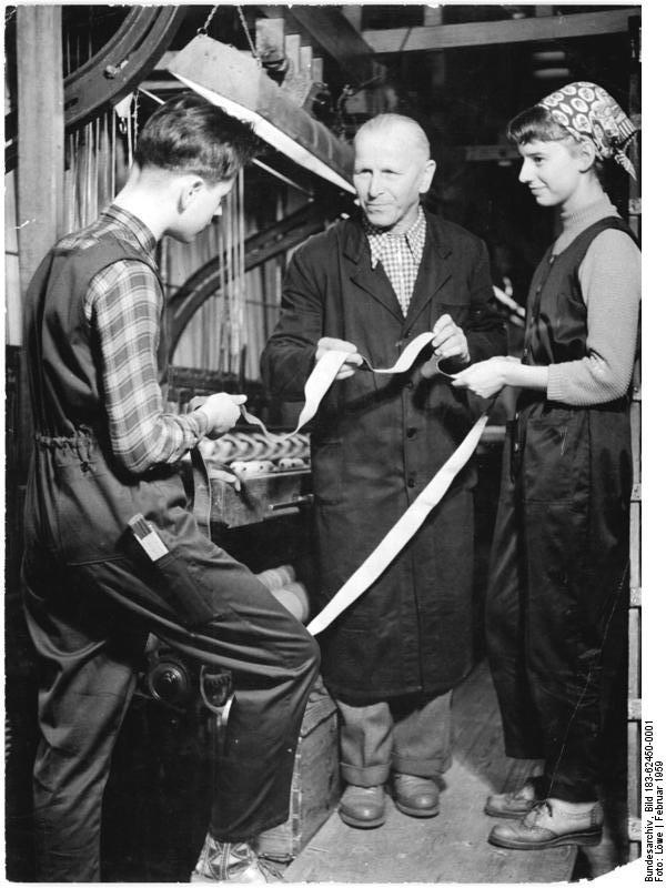 Zentralbild-Löwe Fröhl- 26.2.1959 Schutzanzüge für den polytechnischen Unterricht auf der Leipziger Frühjahrsmesse Schutzanzüge für den polytechnischen Unterricht stellt erstmals in der DDR der Privat-Betrieb mit staatlicher Beteiligung Alfred Thieme aus Pulsnitz, Kreis Bischofswerda her. Die sogenannten "Polyanzüge" werden in den Größen für 8 bis 15jährige angefertigt. Die aus strapazierfähigem Baumwollköper genähten halsfreien und ärmellosen Kombinationen haben für die Mädel modische 7-8-Hosen. Etwa 20000 Polyanzüge wird der Betrieb bereits im ersten Quartal 1959 an den Handel ausliefern. UBz: Polytechnischer Unterricht im VEB Gummiband und Gurtweberei in Pulsnitz. Renate und Alfred im neuen "Polyanzug" lassen sich vom Kollegen Paul Boden an der Webmaschine das Entstehen des Gummibandes erläutern.